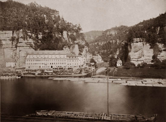 Hřensko